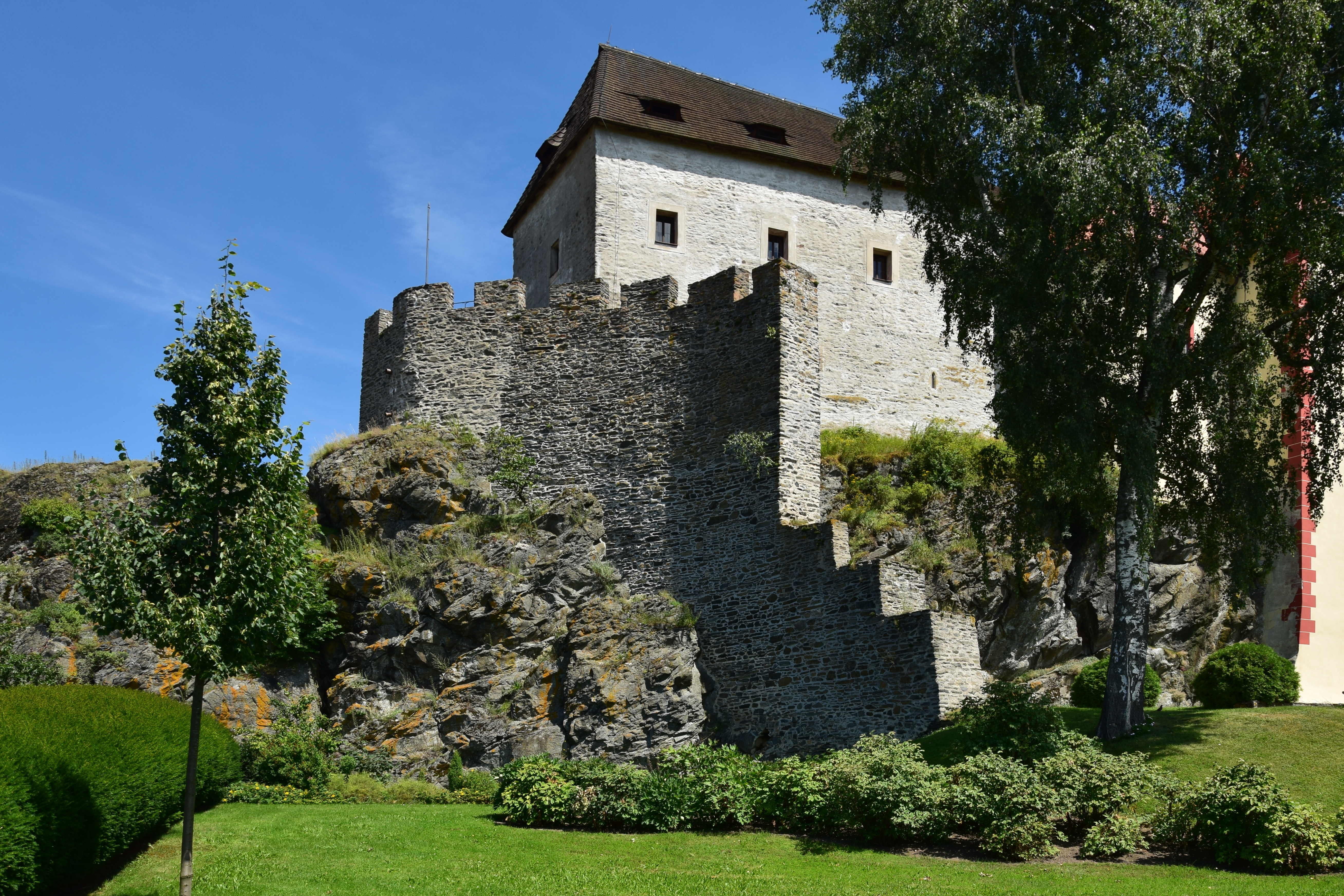 Hrad Kámen – torzo hradby